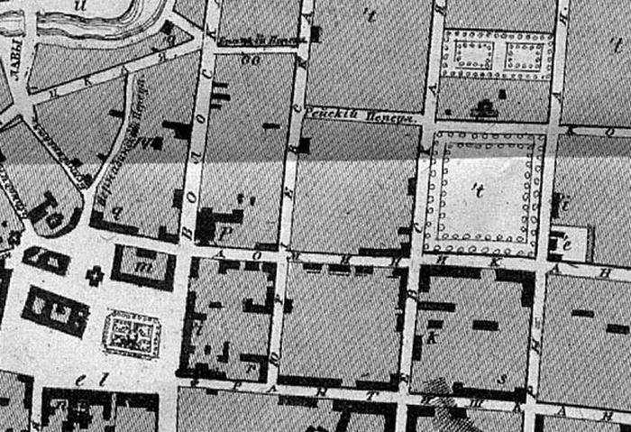 Беларуская (тарашкевіца): Менск (Miensk), Новае Места (Novaje Miesta). Плян